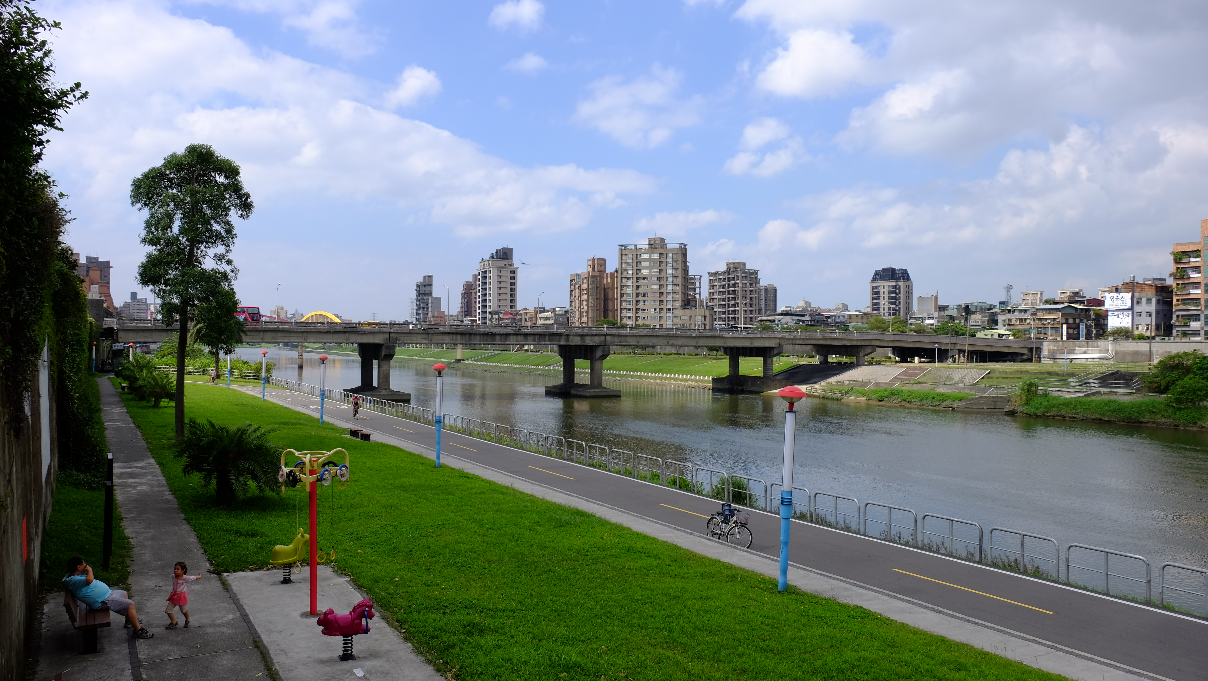 從成美左岸河濱公園疏散門樓梯東北望成美橋。